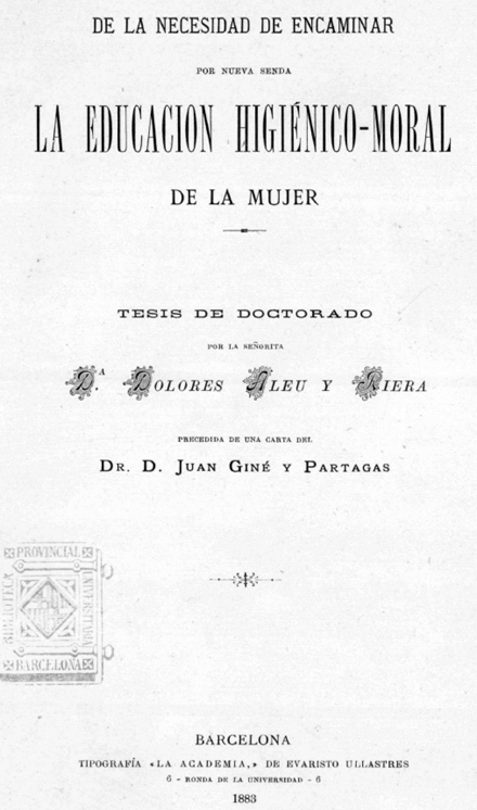 Aleu i Riera, D. (1883). De la necesidad de encaminar por nueva senda la educación higiénico-moral de la mujer. Tesis doctoral defendida el 16 de octubre de 1882 y publicada el 1883. Barcelona: Universitat de Barcelona.